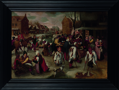 Maarten van Cleve, De viering van de Halfvastenfeesten, 1527-1577, olieverf op eikenhouten paneel, 77 x 109 cm